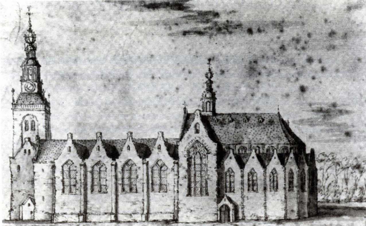 De Sint Janskerk te Gouda voor de brand van 1552. 18e eeuwse kopie naar een tekening van Jacobus Stellingwerff